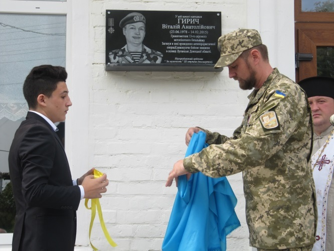 Памятная доска Виталию Гиричу в городе Корюковка (Черниговская область).